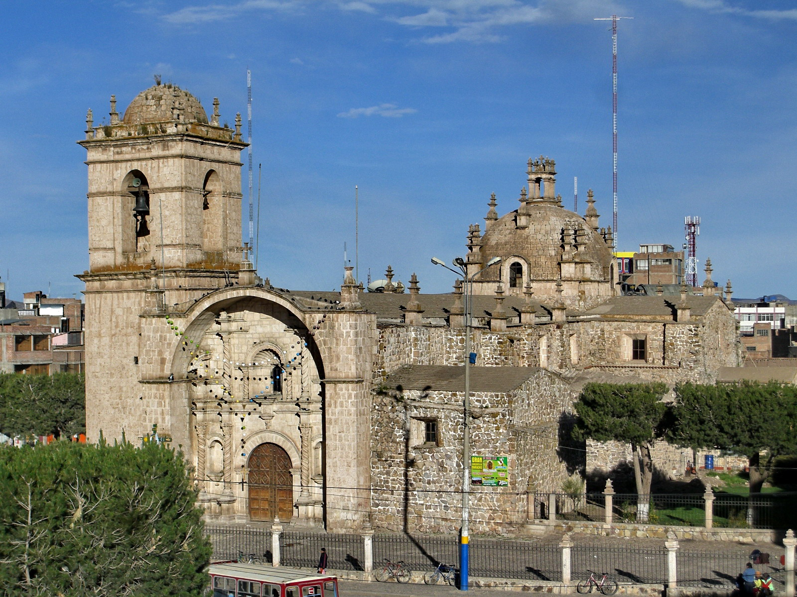 Iglesia Colonial de Santa Catalina ubicada en la Plaza de armas de Juliaca